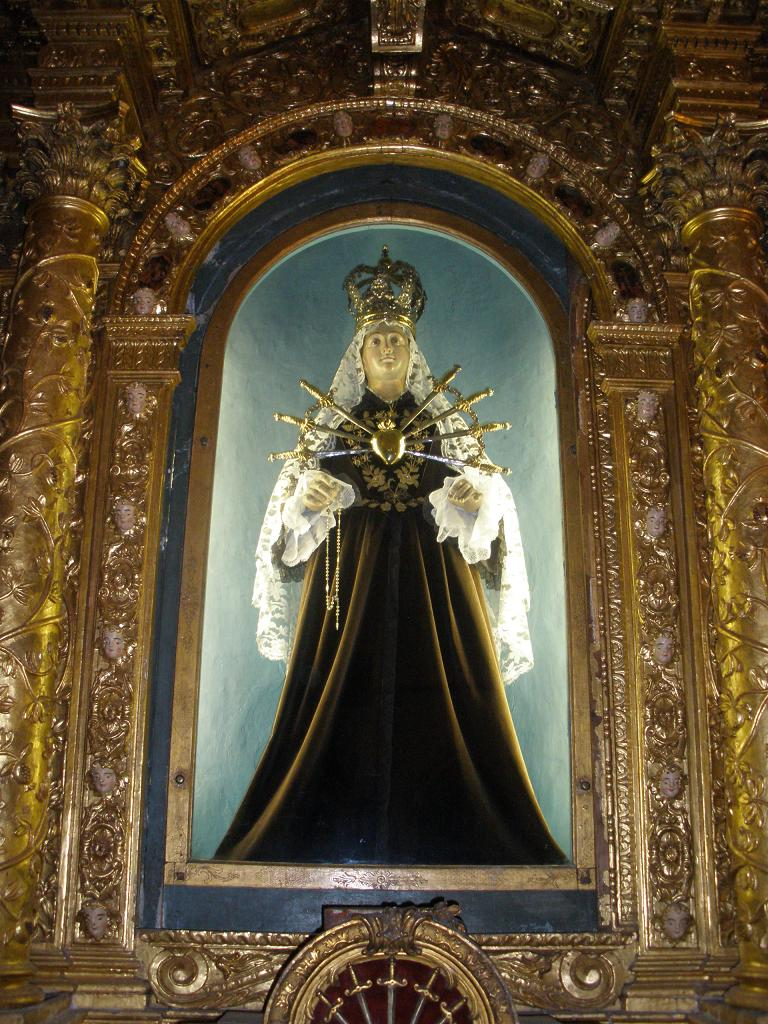 Belluno, chiesa di Santo Stefano, interno, la statua della Madonna addolorata (o delte 7 spade).